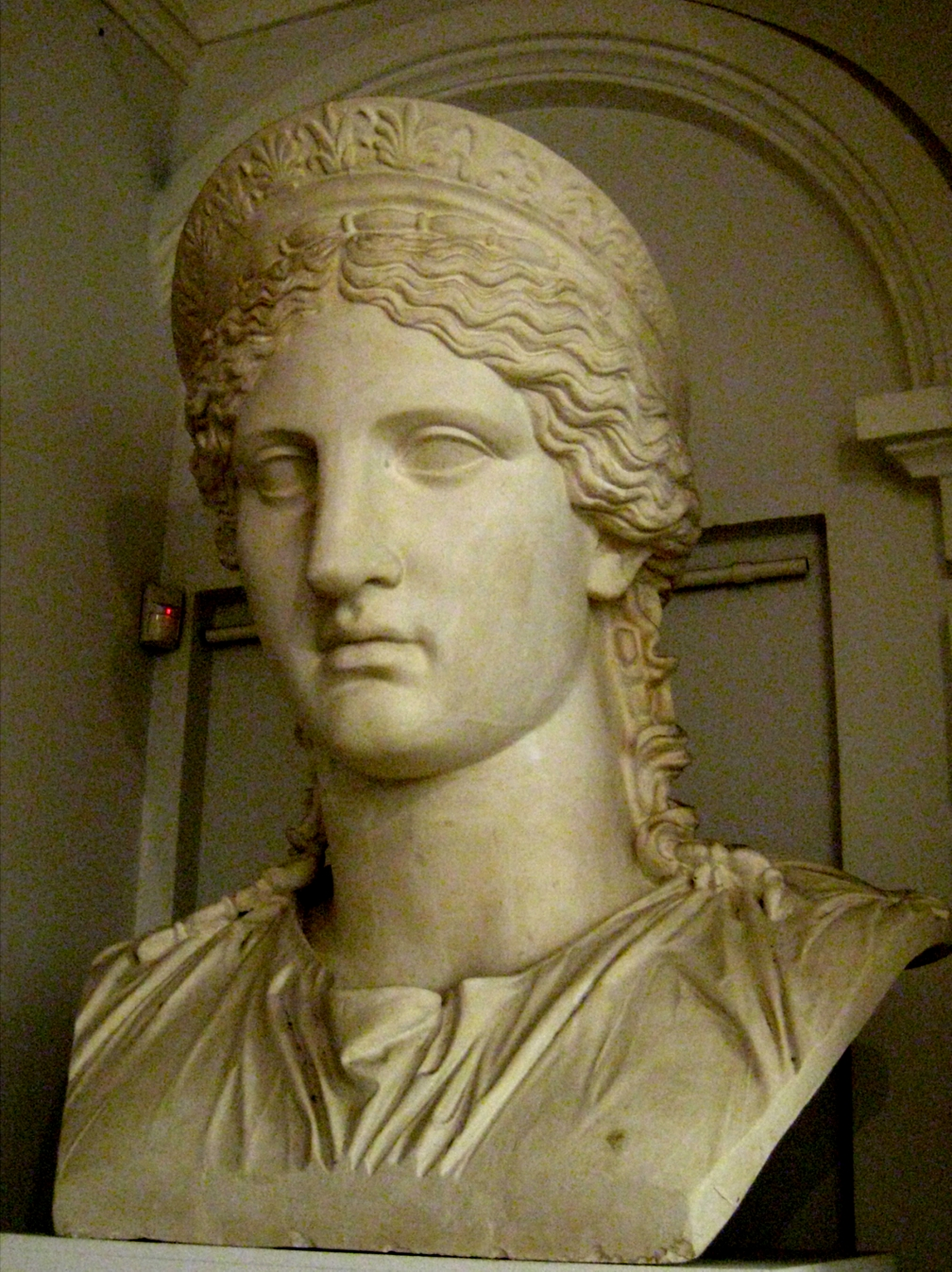 Antonia Minor (Hera Ludovisi). Cast